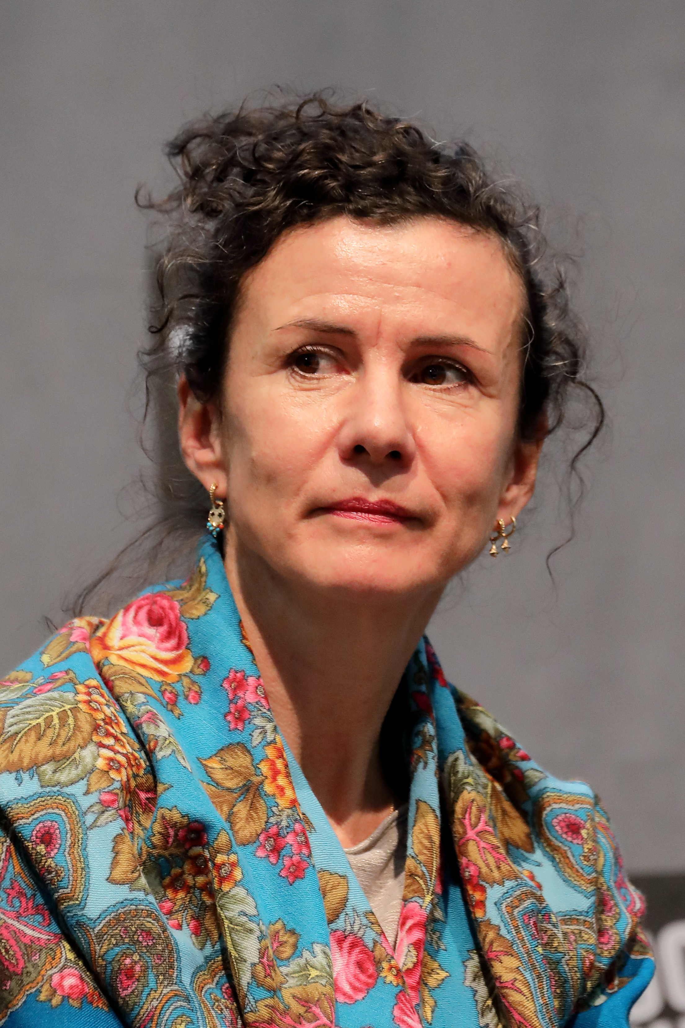 Die Schweizer Comiczeichnerin und Illustratorin Anna Sommer auf der Radio Wien-Bühne der Wiener Buchmesse 2018.